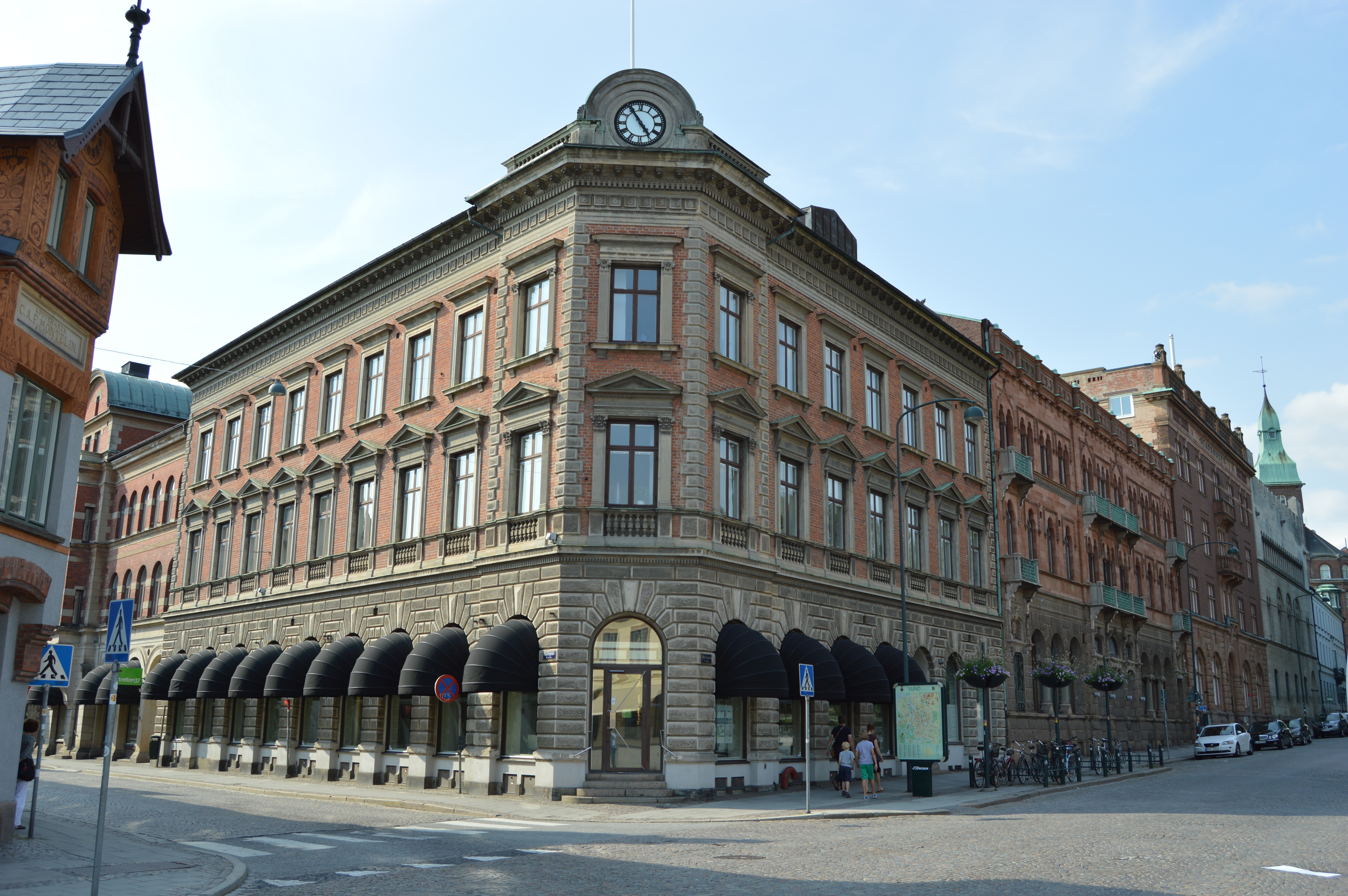 Kyrkogatan 7 i Lund (i bildens mitt)